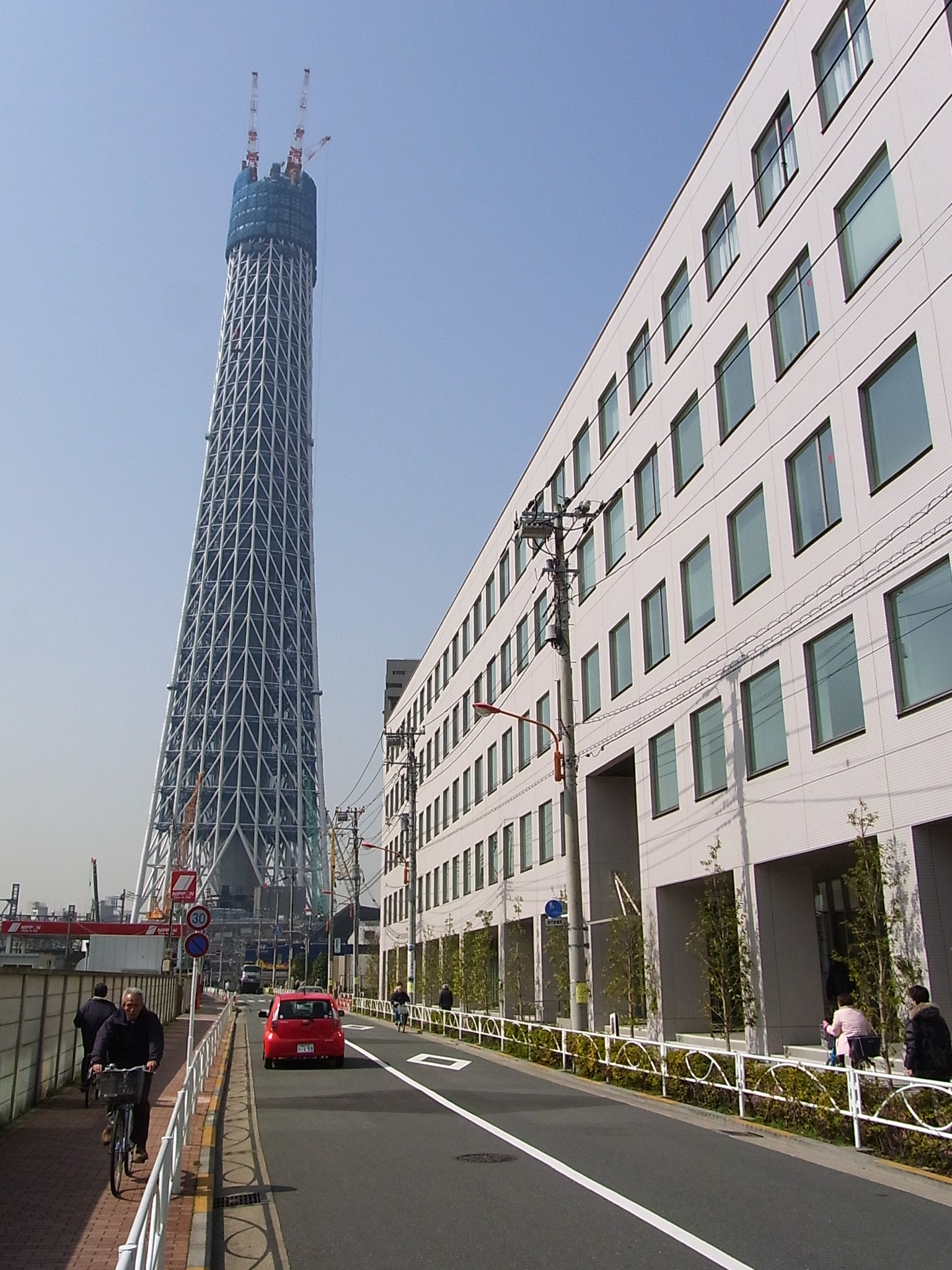 東武鉄道本社